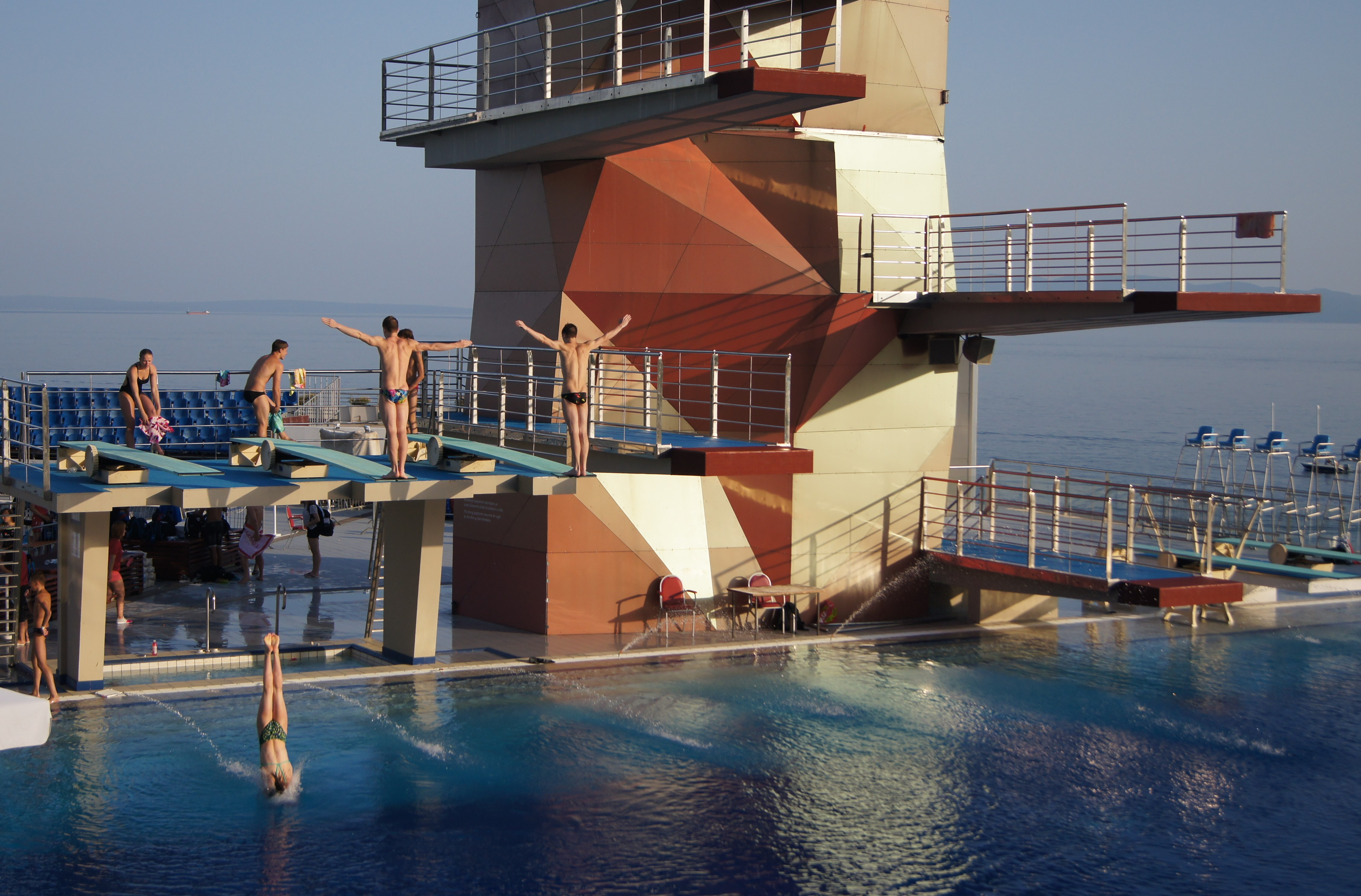 Trening skokov v vodo. Skakalni stolp, skakalnice in bazen za skoke v vodo. Bazeni Kantrida - Rijeka, Hrvaška.